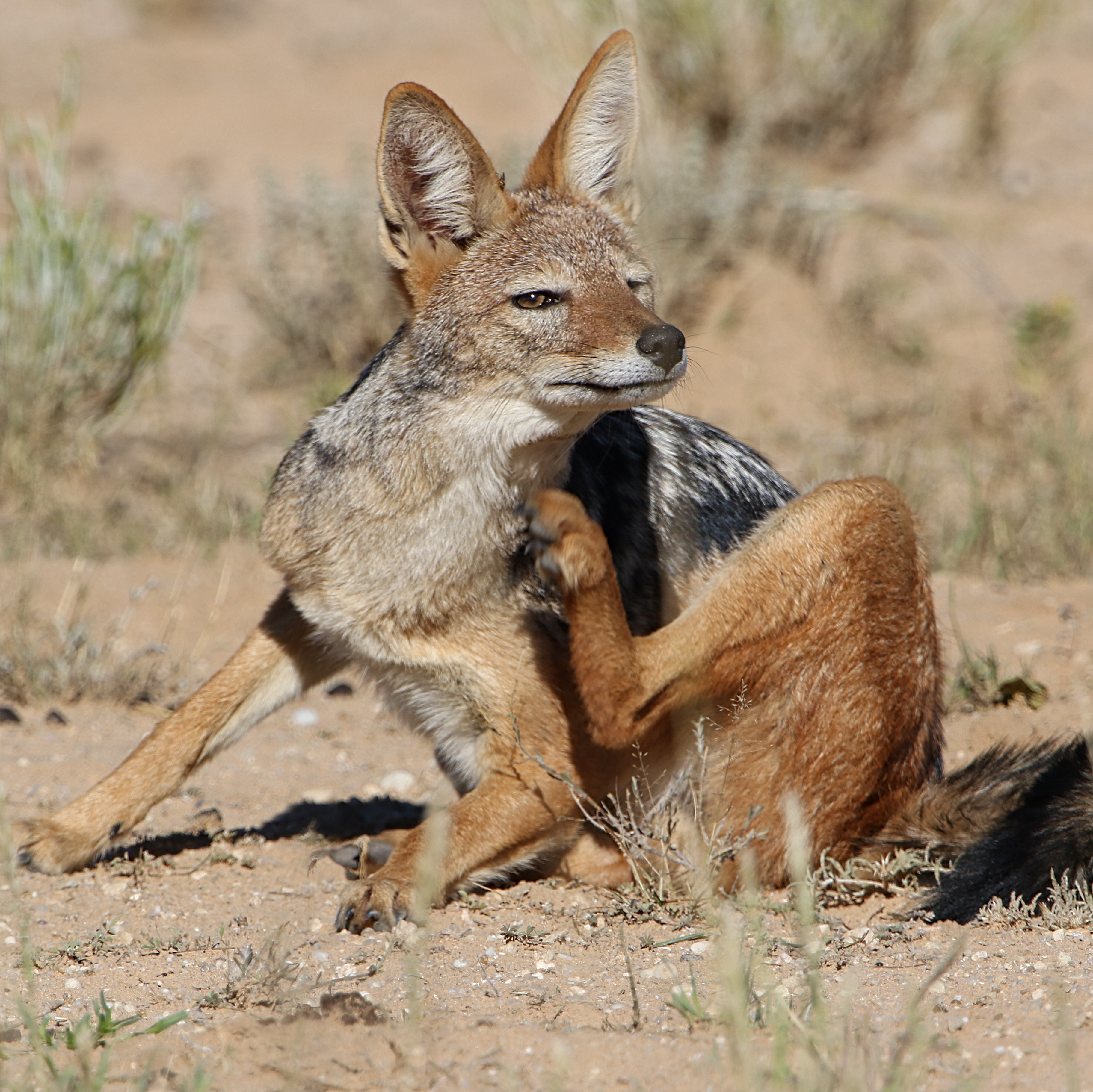 Black-backed jackal, Kgalagadi Transfrontier Park